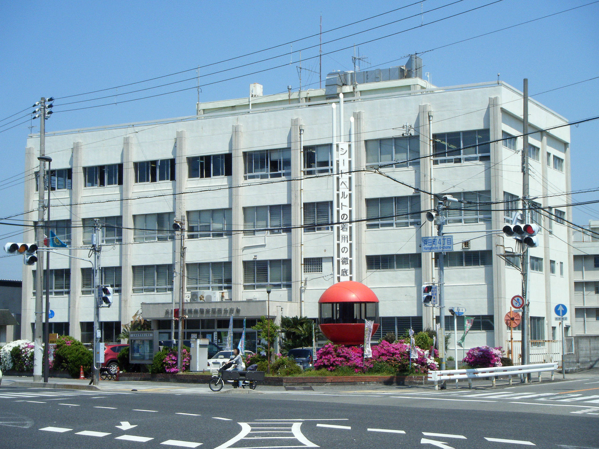 尼崎南警察署西分庁舎（旧尼崎西警察署） 外観